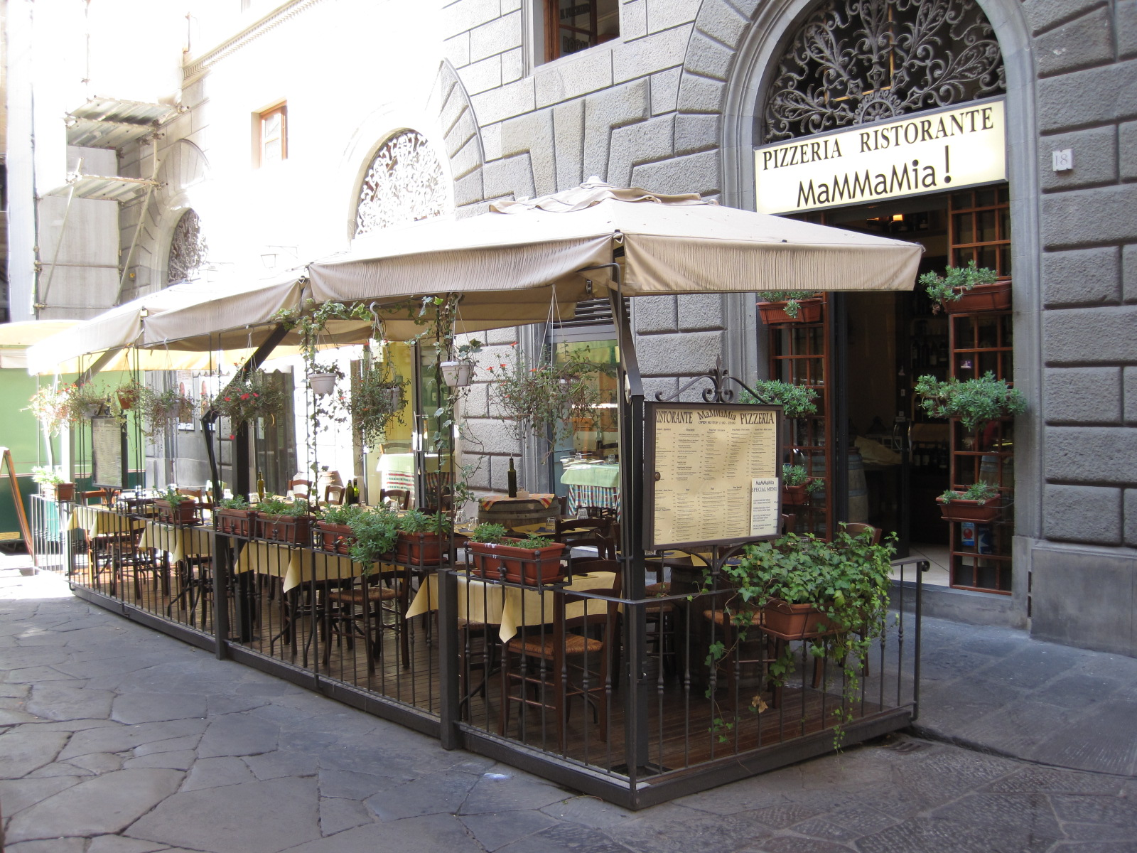 Restaurant Pizzeria de Florence